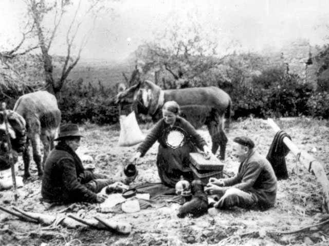 Estampa campesina - Mojados (Valladolid) - Cuaderno. Álbum de Valladolid - Fotografía 60 x 42 B/N